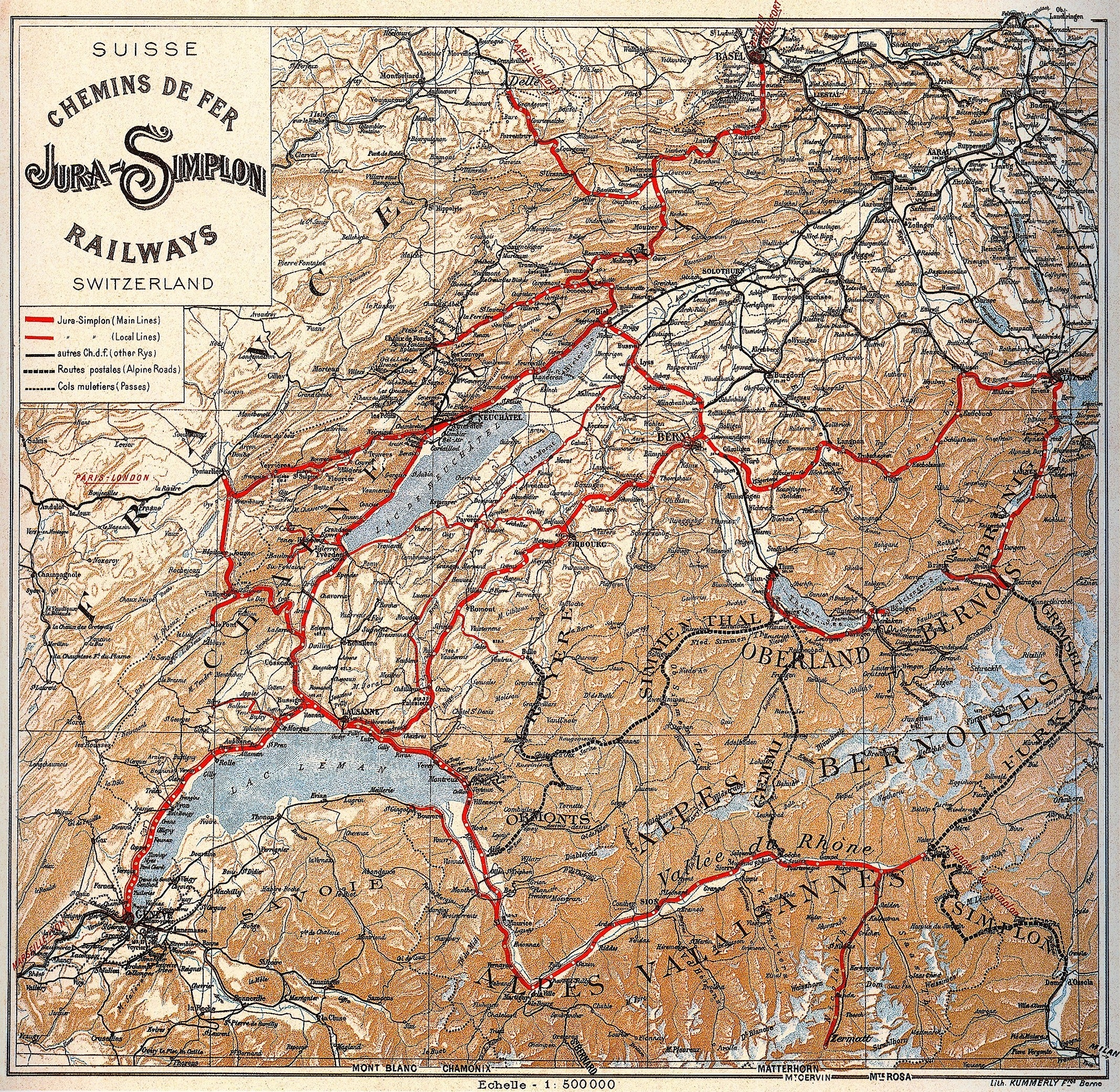 Die Jura–Simplon-Bahn (JS) war vor der Verstaatlichung eine der grossen Privatbahn-Gesellschaften der Schweiz. Sie entstand 1890/91 durch die Fusion der wichtigsten Westschweizer Bahnen Suisse-Occidentale–Simplon, Pont–Vallorbe und Jura–Bern–Luzern.